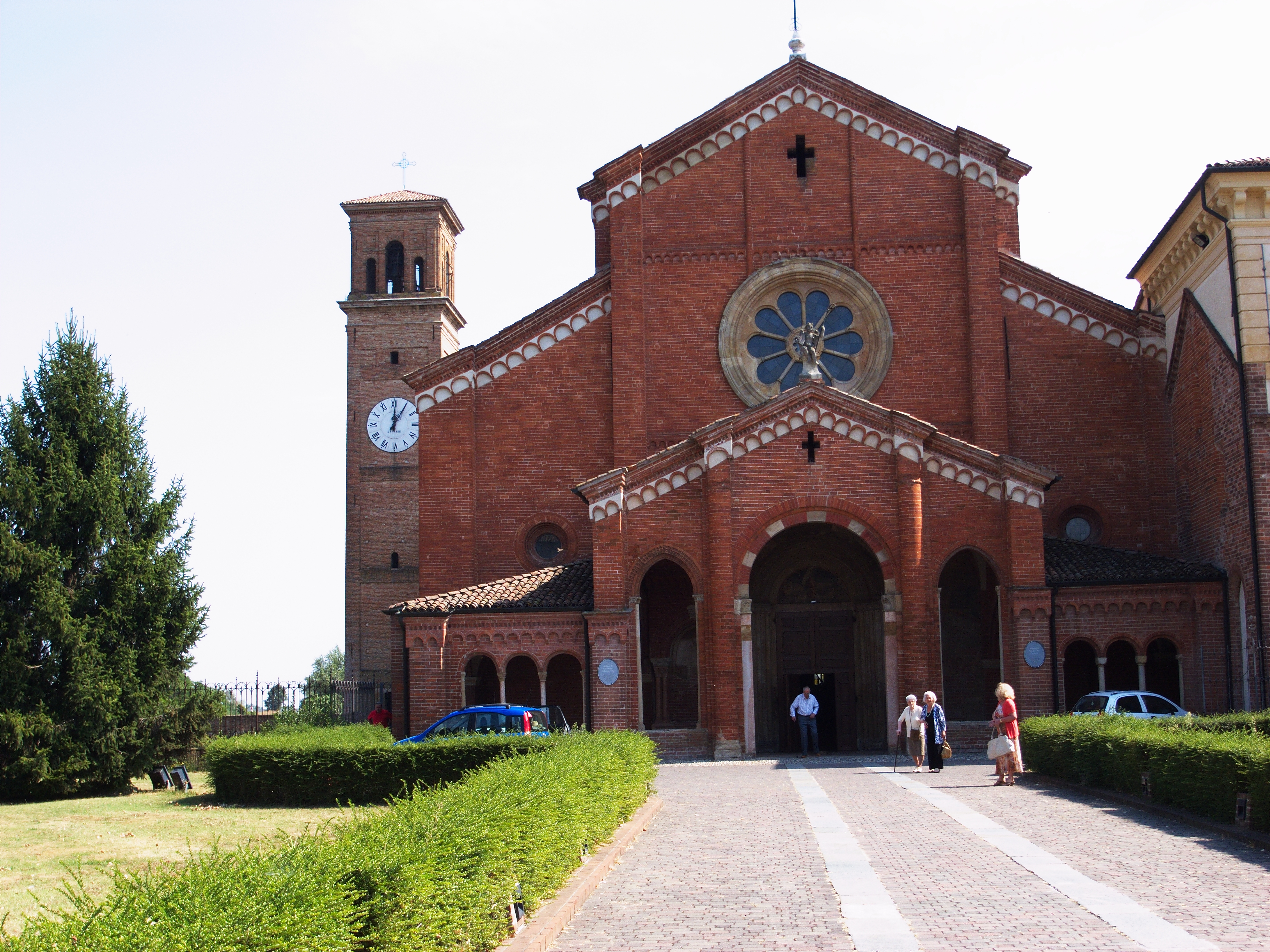 Abbazia di Chiaravalle della Colomba : Facciata / Chiaravalle della Colomba Abbey : Front